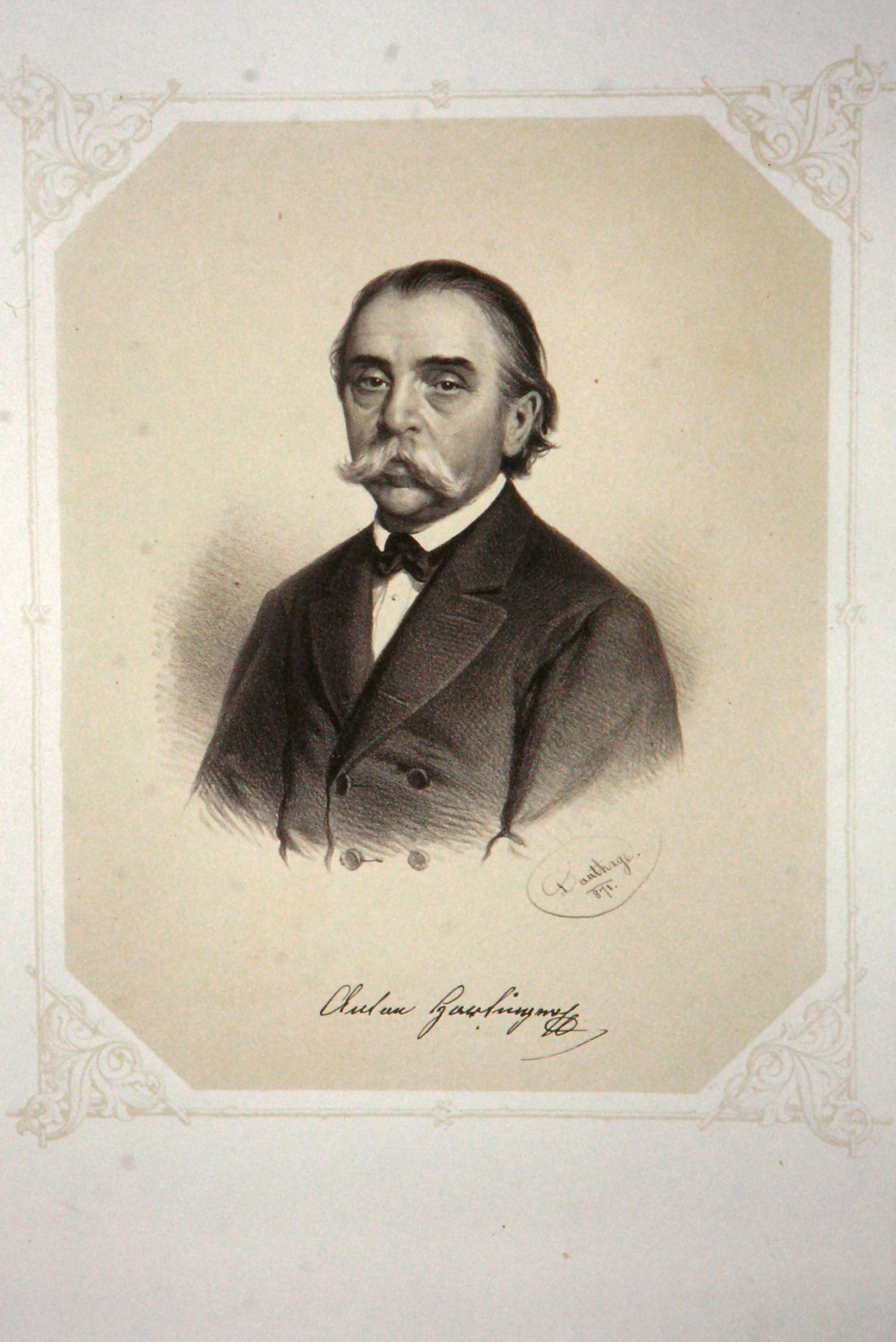 Anton Hartinger (1806-1890), österreichischer Blumenmaler, Lithograph. Lithographie von Adolf Dauthage, 1871